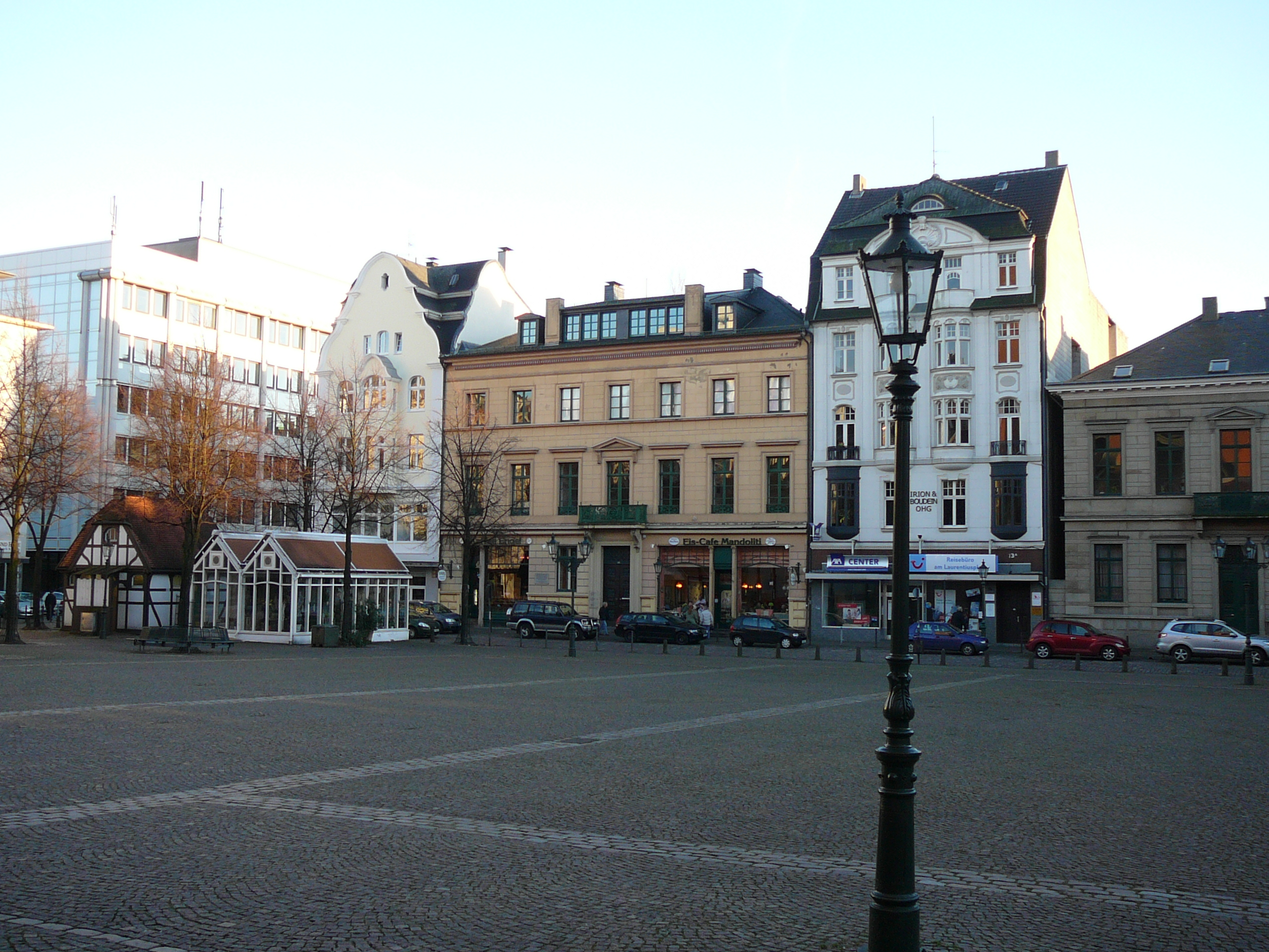 Villa in der Friedrich-Ebert-Str, Wuppertal